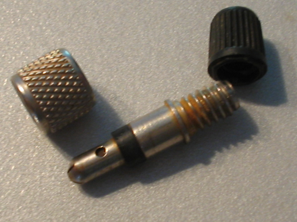 fietsventiel (setje)